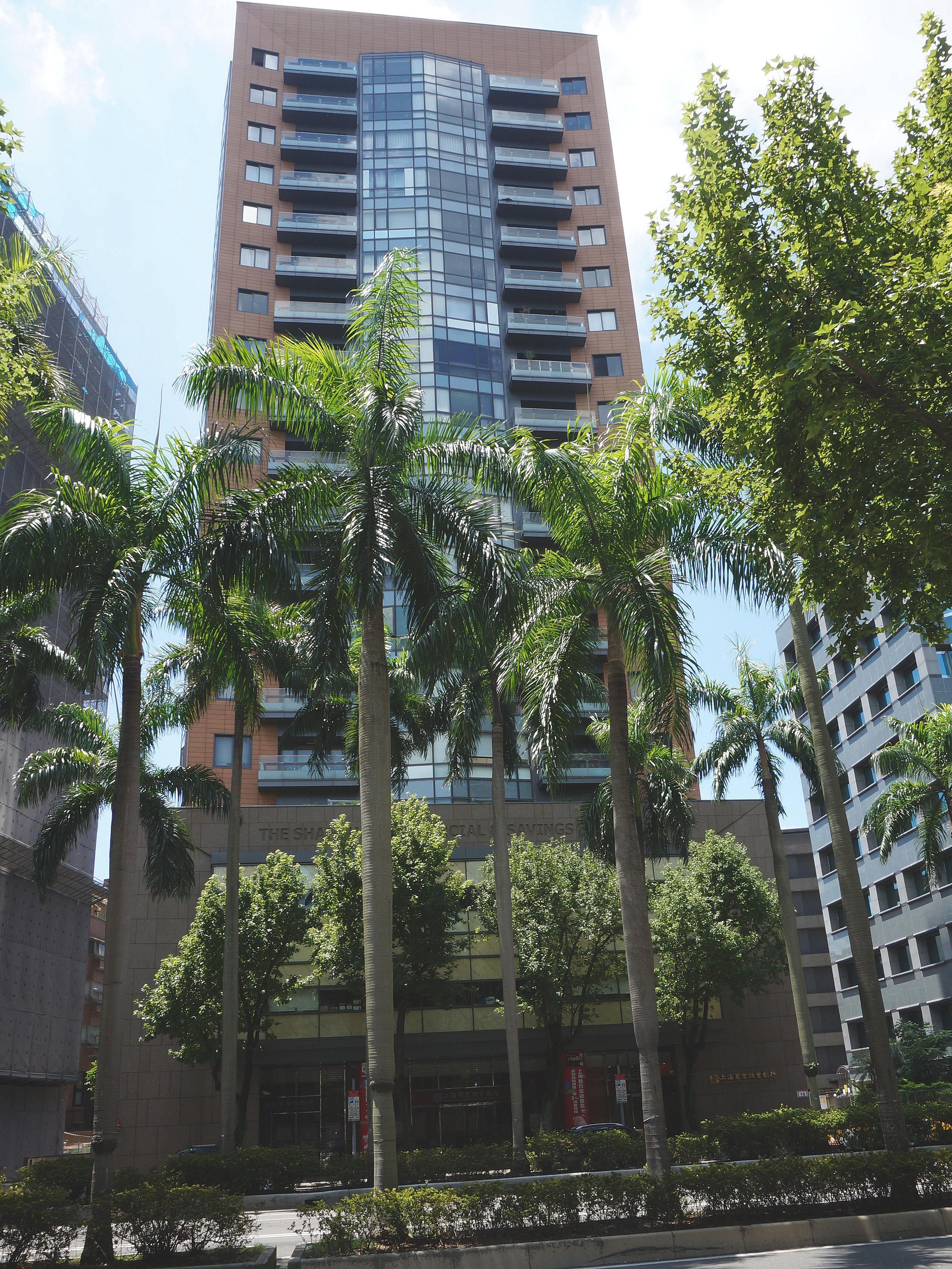 2007年上海商業儲蓄銀行原總行大樓拆除改建的「上海銀行仁愛大廈」，姚仁喜設計，一樓為上海商業儲蓄銀行仁愛分行，地址：臺北市中正區仁愛路二段16號。